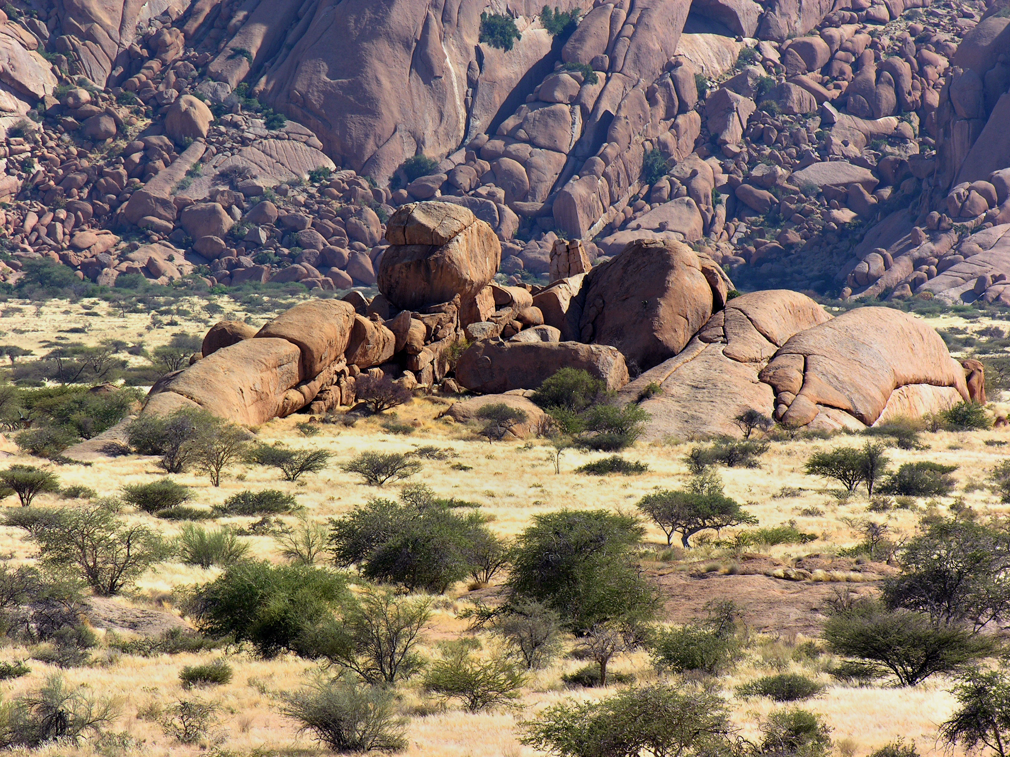 Namibia, Spitzkoppe